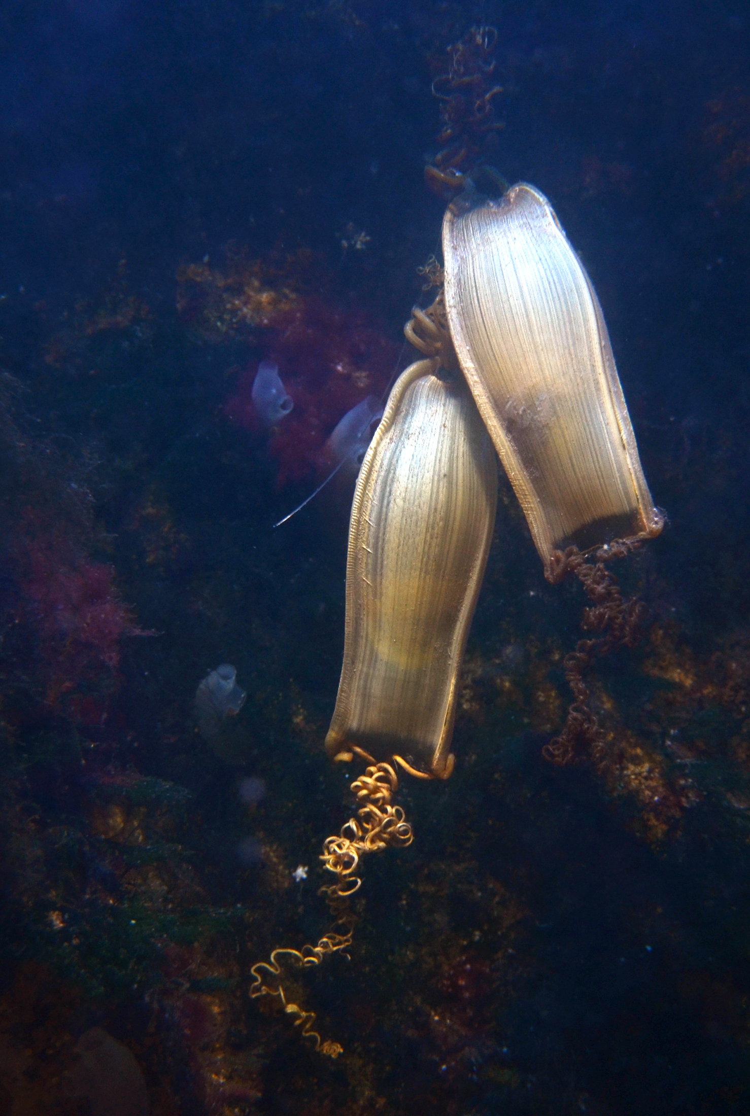 Oeufs de grande roussette (Scyliorhinus stellaris). Aquarium de Vannes.